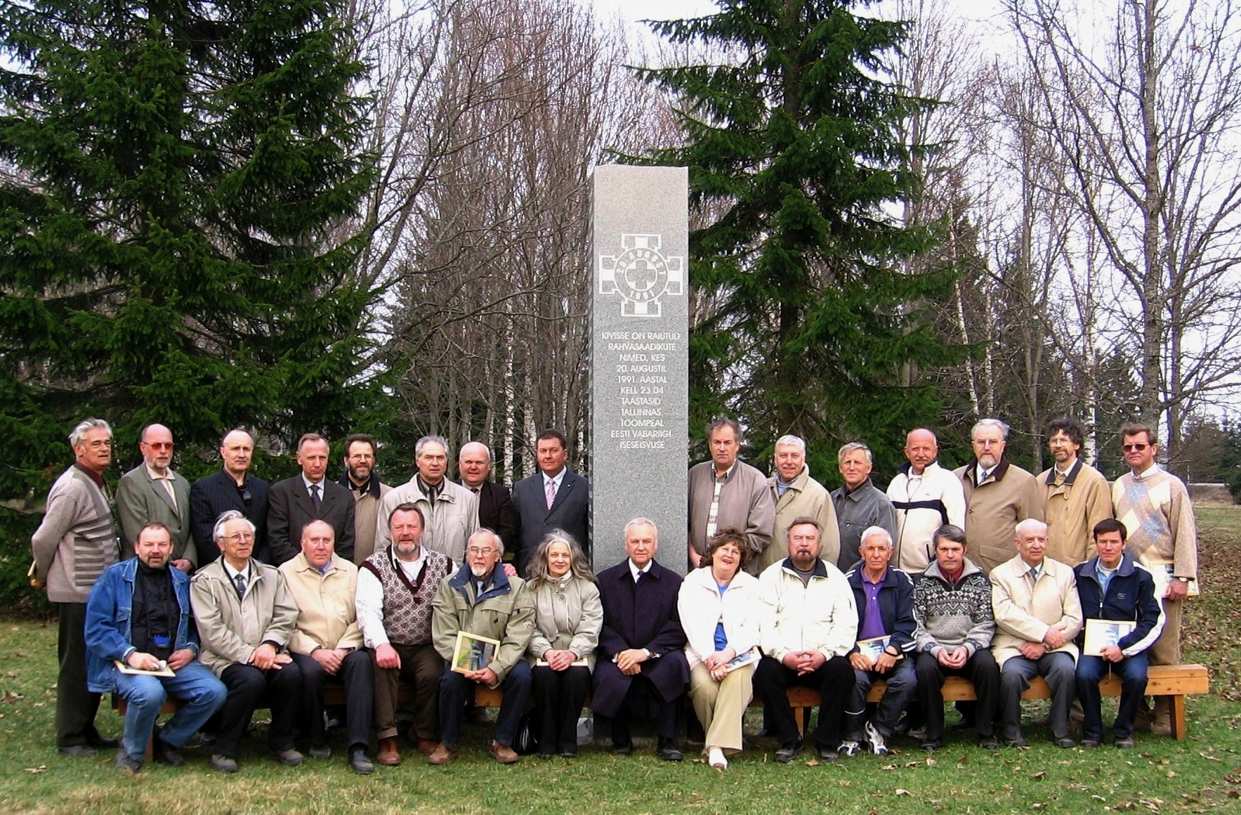 Eesti iseseisvuse taastajaid 20. augusti 1991 mälestussamba juures Põltsamaa Sõpruse pargis 29. aprillil 2006.